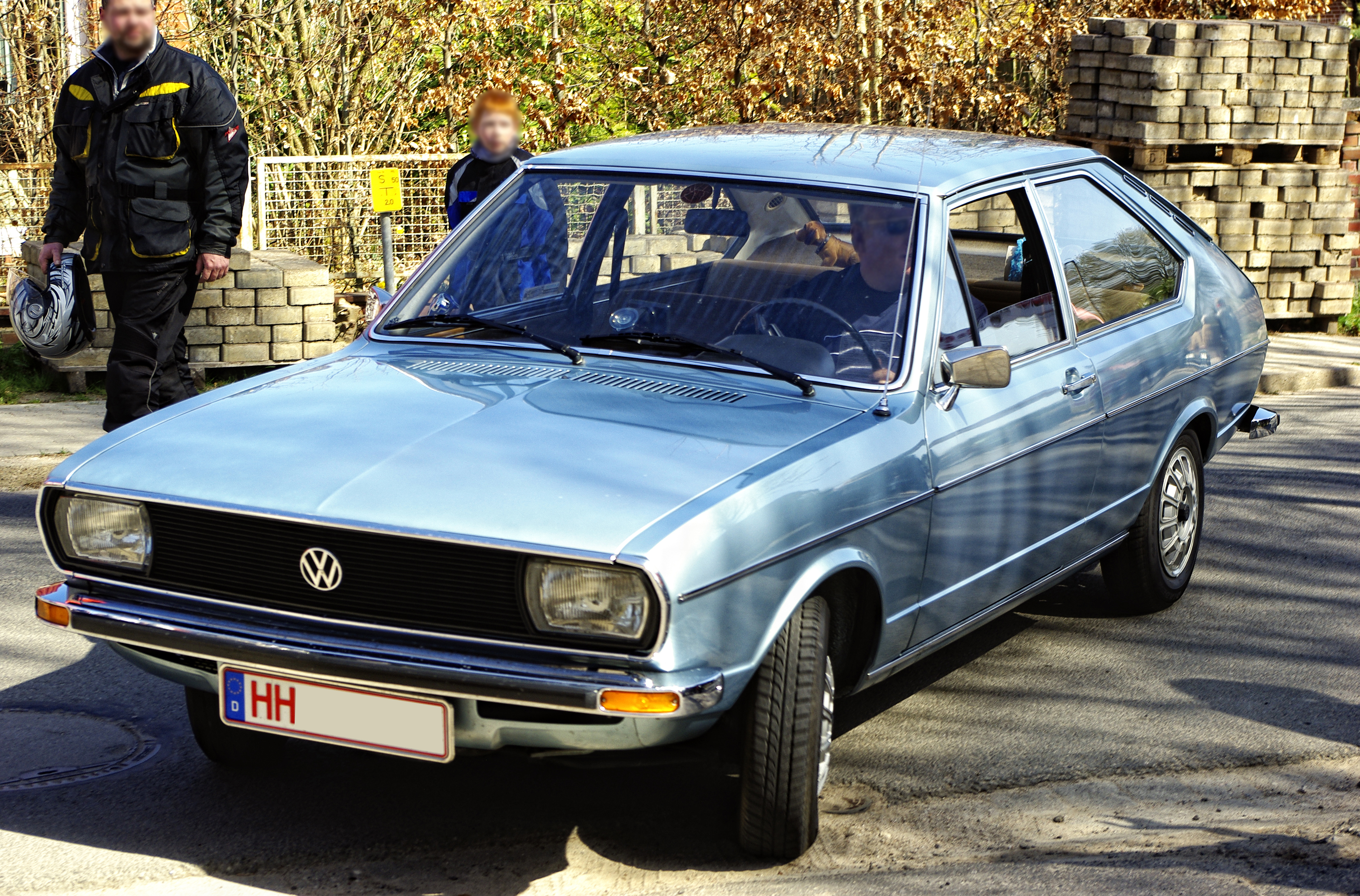 Passat L B1 (Typ 32)